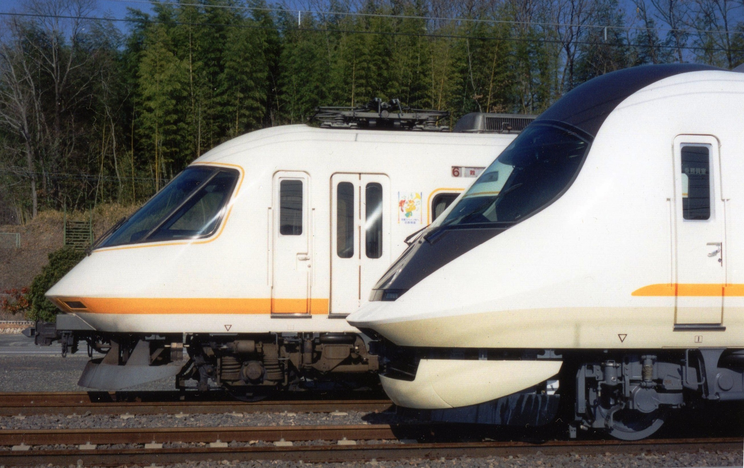 近鉄21020系と21000系原型車との並び（2002年12月23日）